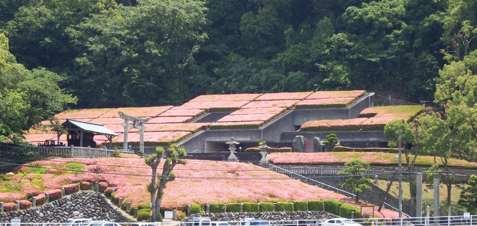 別子銅山記念館の全景